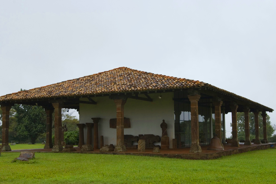 Endereço: Rua São Nicolau, S/Nº – São Miguel das Missões – RS. Tel: (55) 3381-1291 Horários: Todos os dias, das 9h às 12h e das 14h às 18h * Durante o horário de verão, o museu fica aberto até as 20h Foto: Divulgação IBRAM